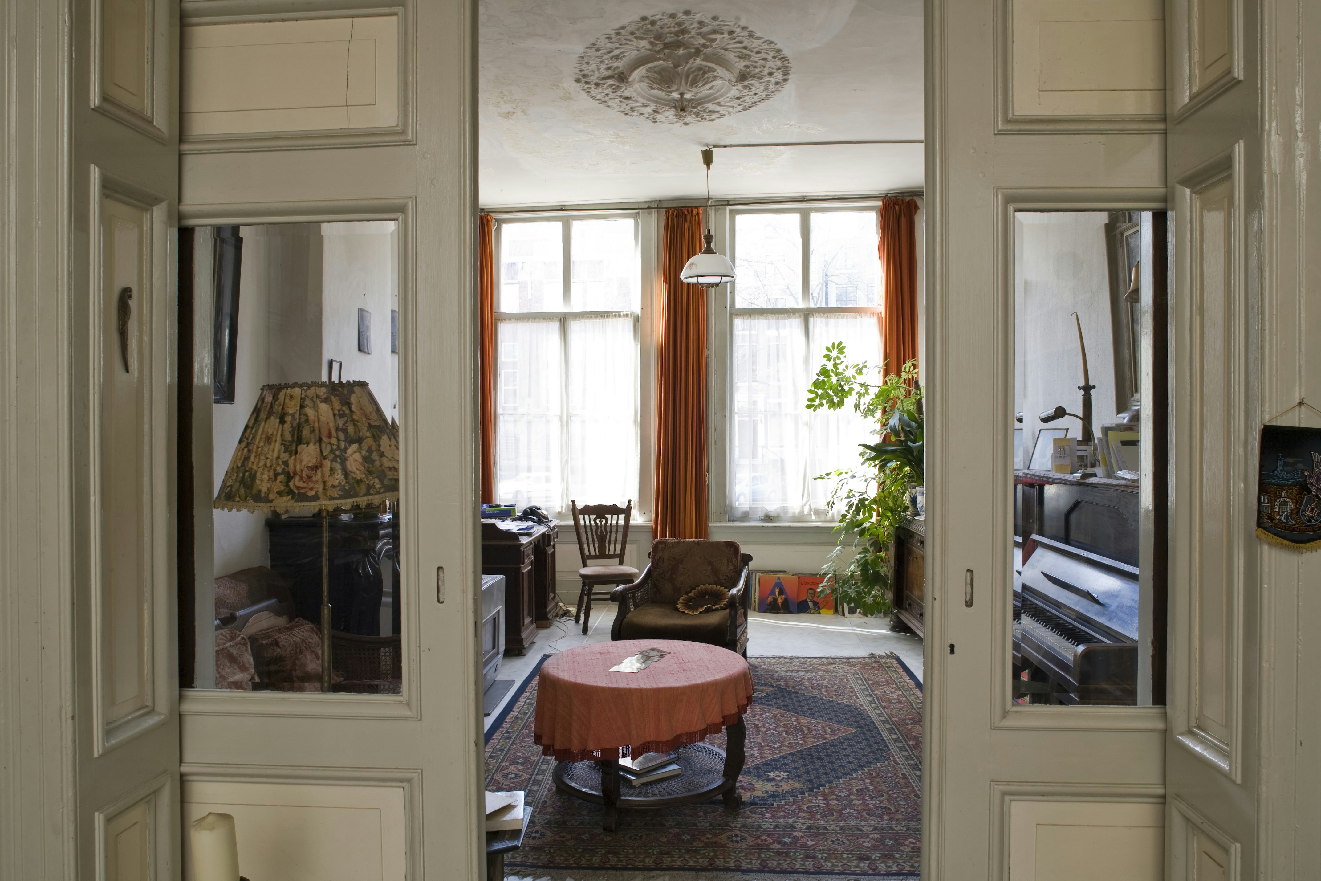 Schuifdeur: Interieur, schuifdeuren in de kamer en suite